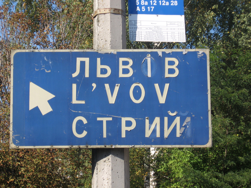 Дорожный указатель. Русские буквы закрашены, сверху нанесены украинские.